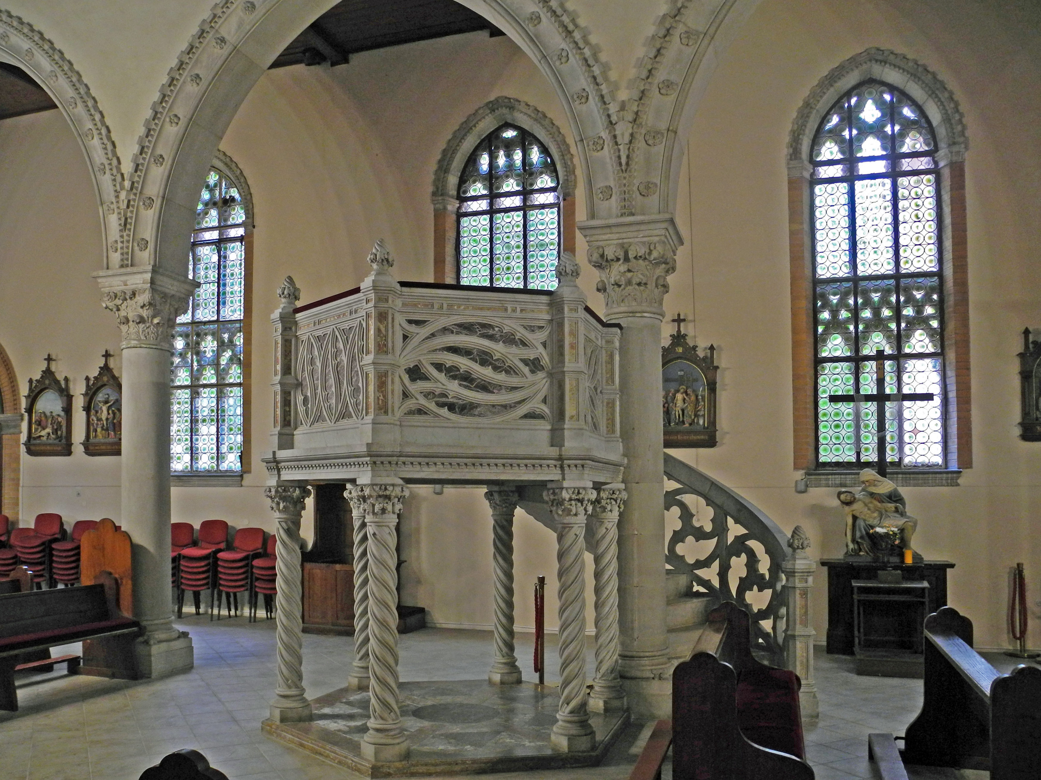 Marmorkanzel im Innenraum der Kirche der Unbefleckten Empfängnis Mariä in Eichwald (Dubí)